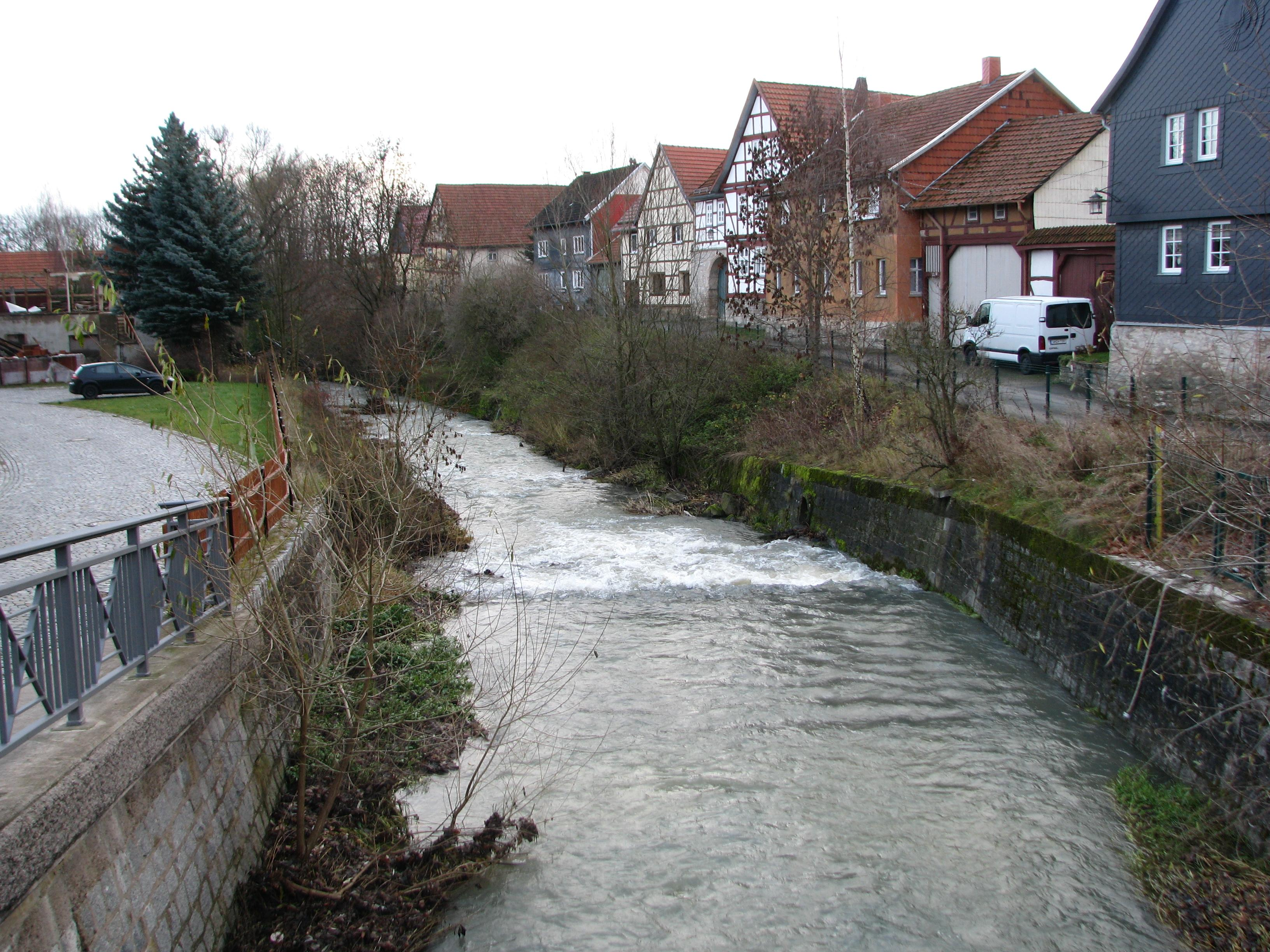 Die Unstrut durch Horsmar, von der Straßenbrücke aus gesehen (Blick nach Osten).